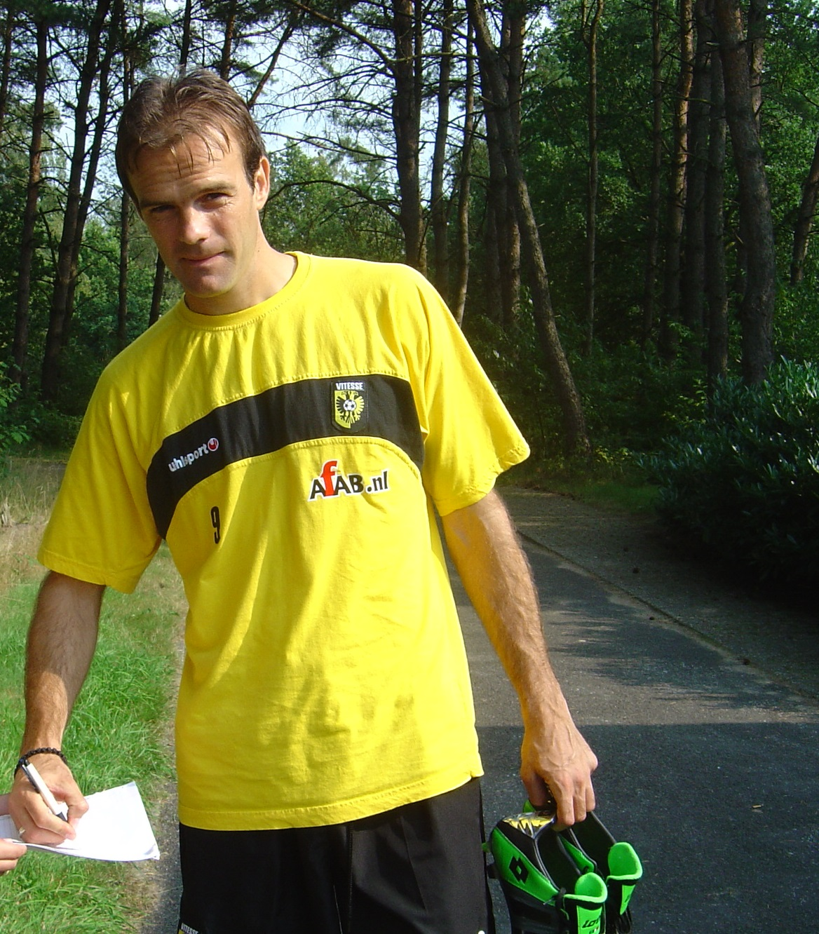 Igor Gluščević in zijn tijd bij Vitesse